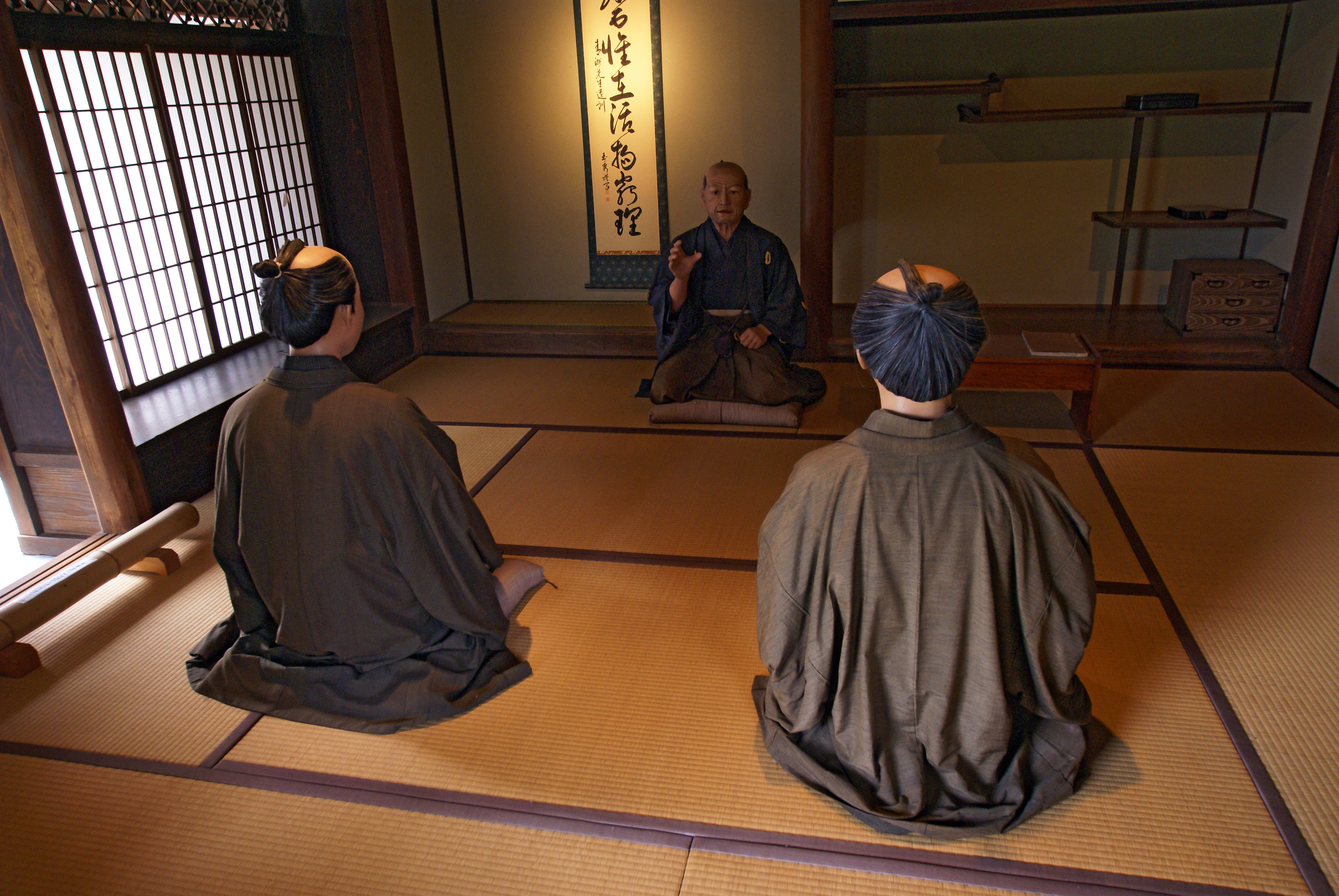 Shunrinken in Kinokawa, Wakayama prefecture, Japan